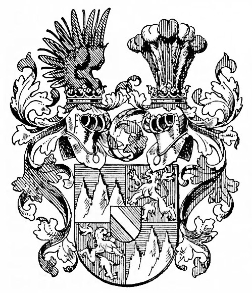 Wappen der Ritter und Edlen von Senger, aus einem oberfränkischen Geschlecht.